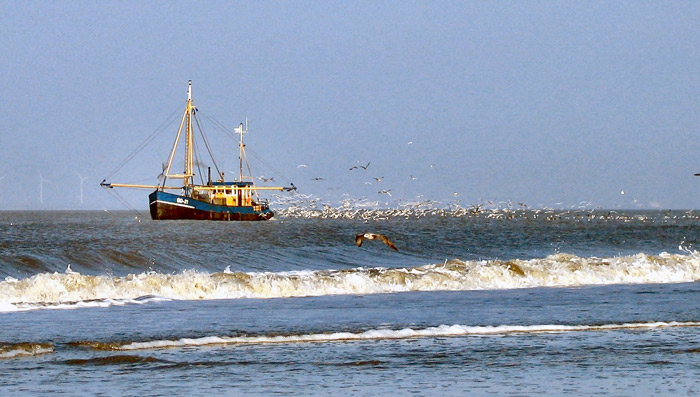 Vissersboot voor de kust van Goeree, de plaats waar een zeereservaat is gepland ter compensatie voor de aanleg van Maasvlakte-2. Eigen foto gemaakt in oktober 2004